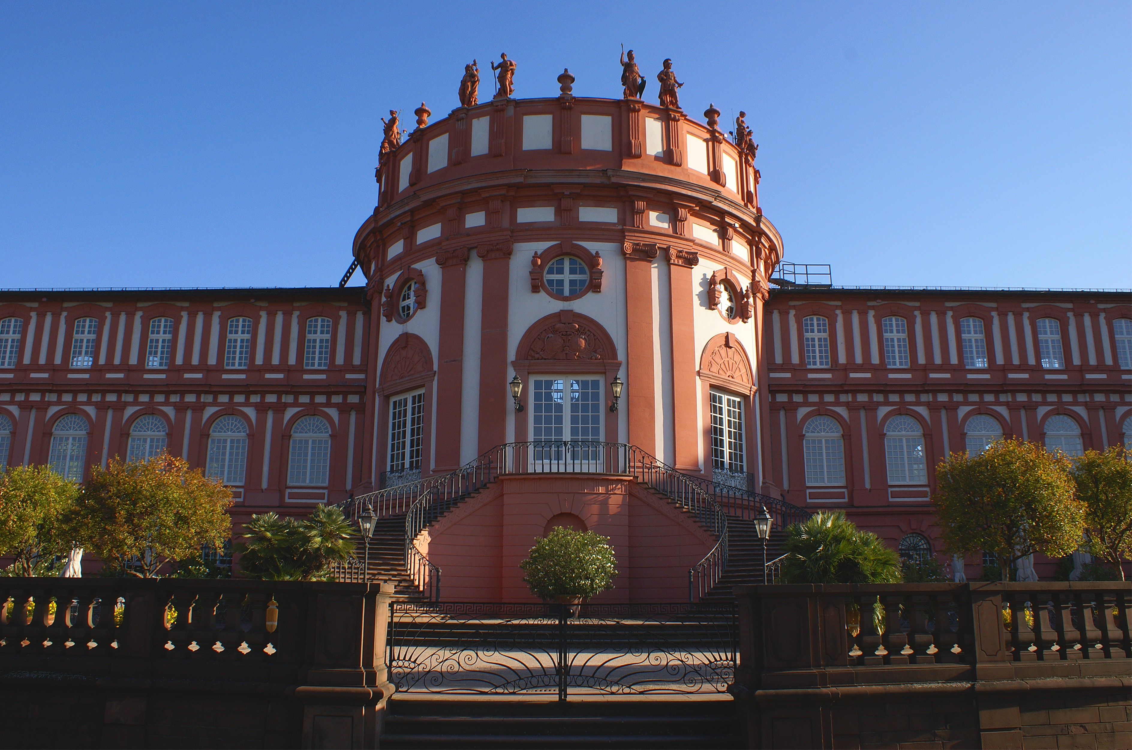 Rotunde des Biebricher Schlosses